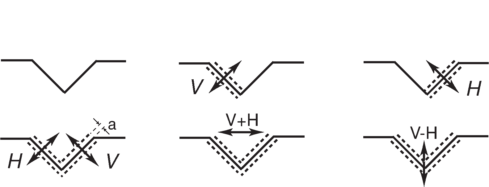 Modulasjon av stereoplate